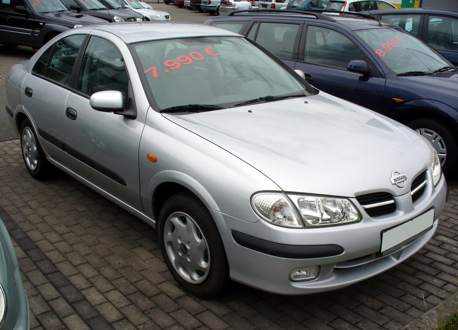 Nissan Almera Stufenheck